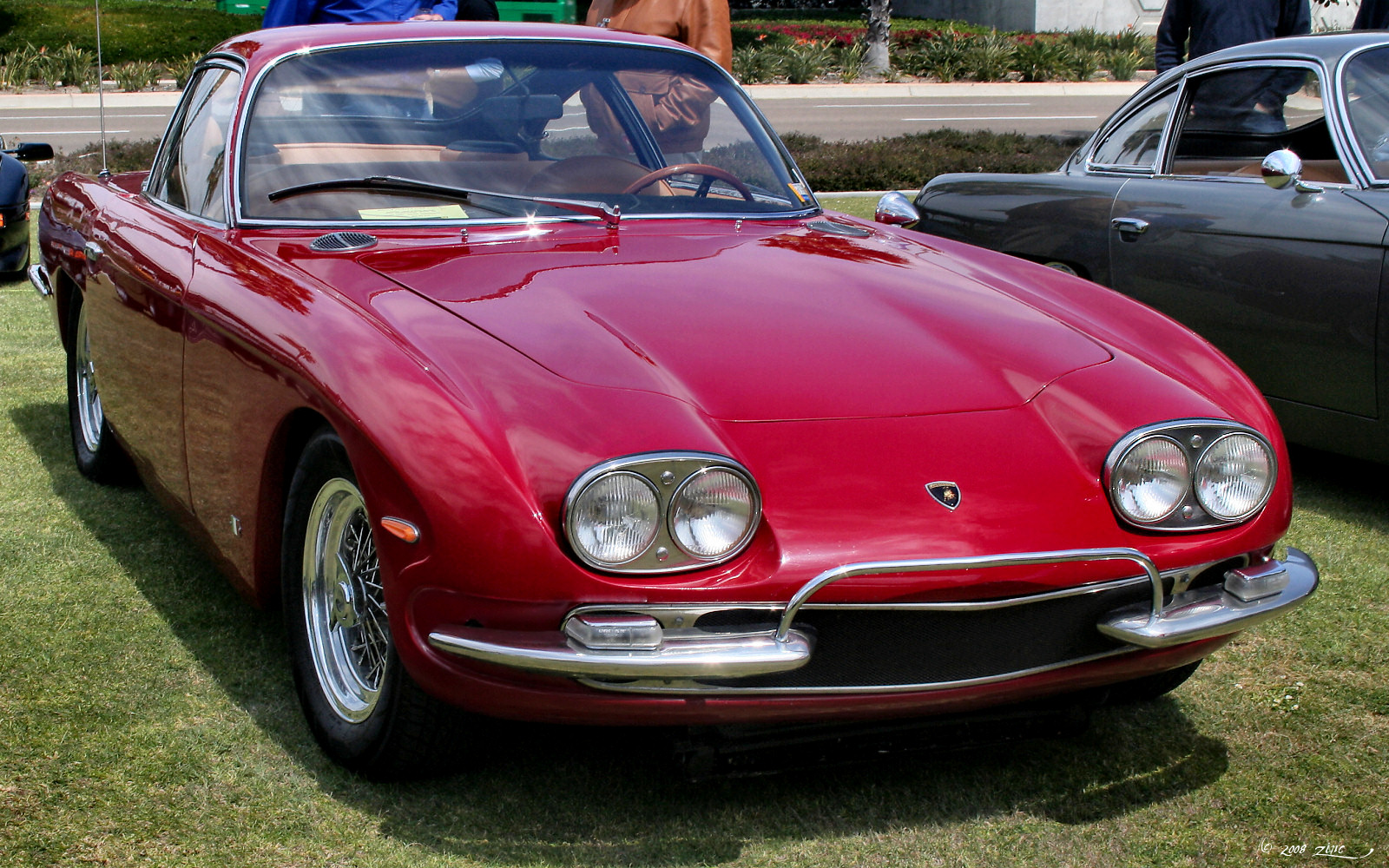 Spanish Landing Park Bella Italian 2008 1967 Lamborghini 400 GT 2+2